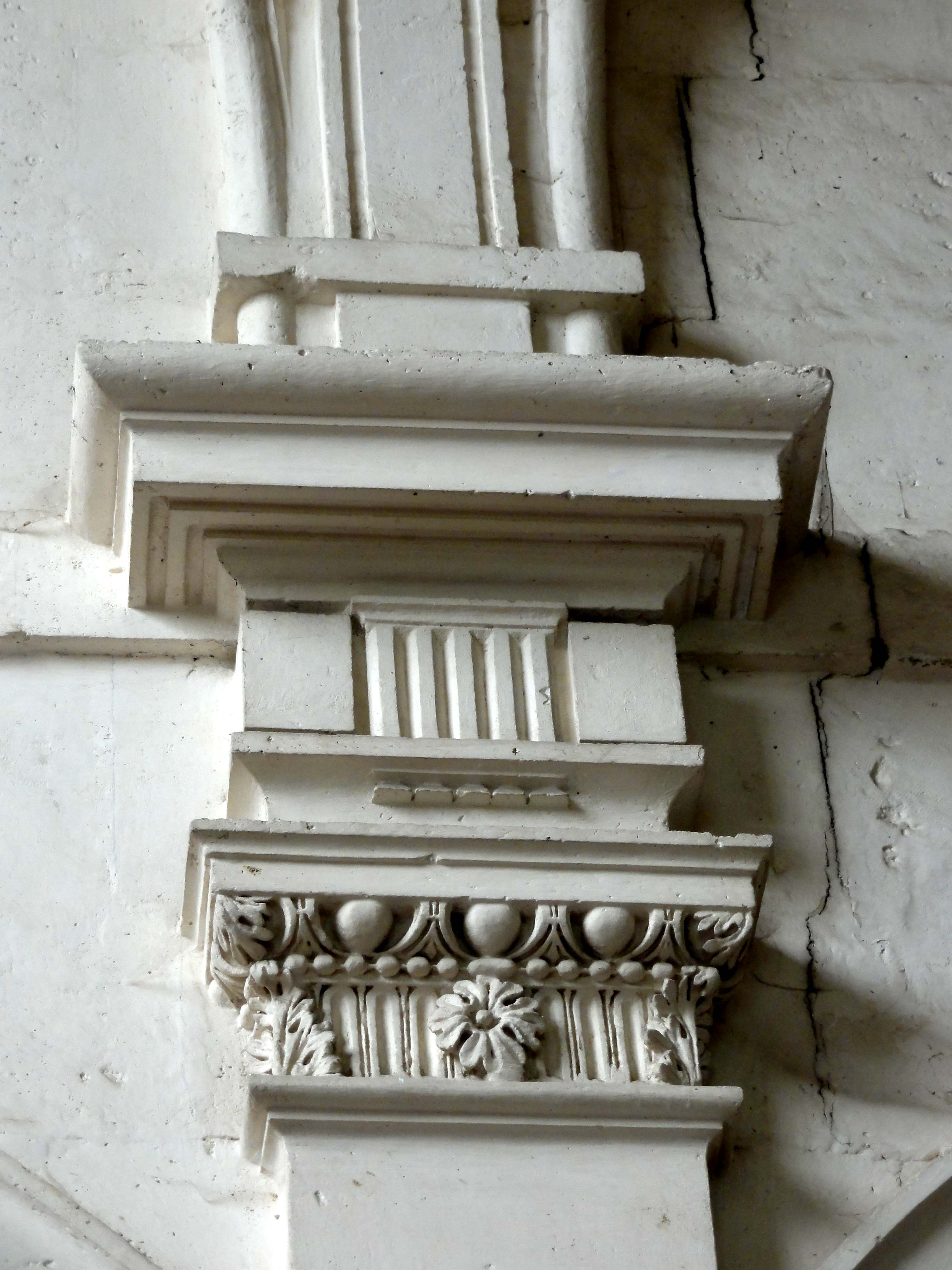 Intérieur de l'église (voir titre).